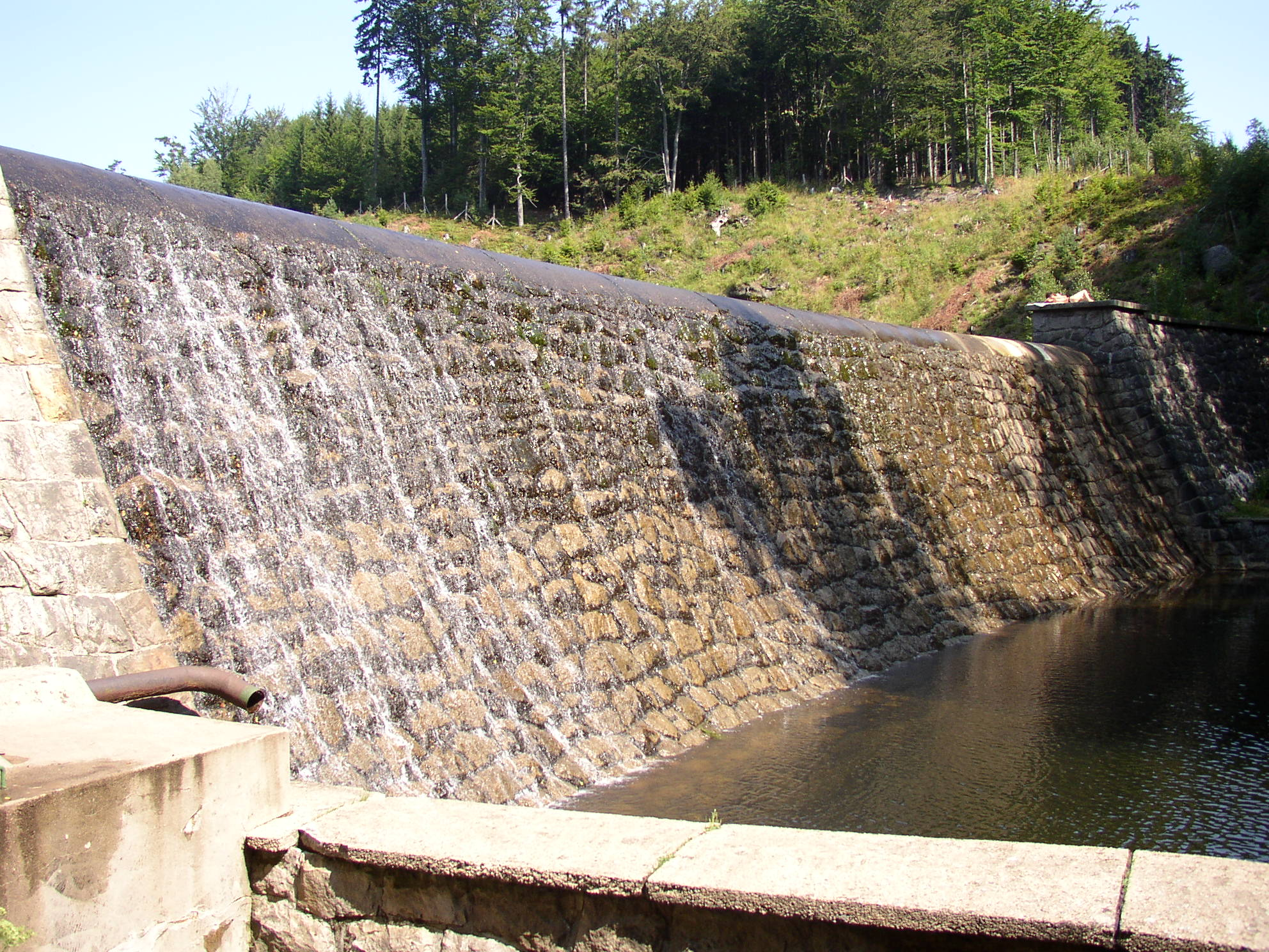 Hráz přehrady Naděje ,Lužické hory, Czech republic